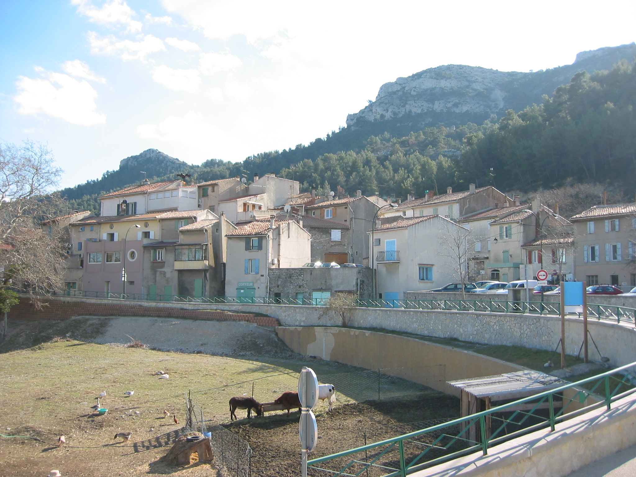 Saint-Savournin depuis le chemin du château (entrée ouest), Bouches-du-Rhône, France. Photo prise le 1er mars 2006. Auteur : Ludovic Ruat (utilisateur:civodule)